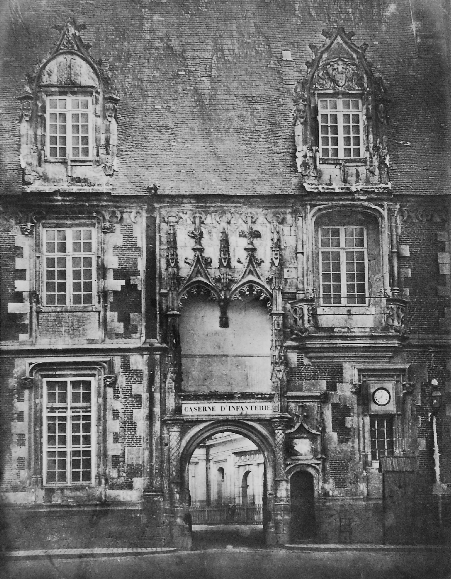 Portal des Schlosses Blois zur Zeit der Nutzung als Kaserne; ohne die Reiterstatue Ludwigs XII.